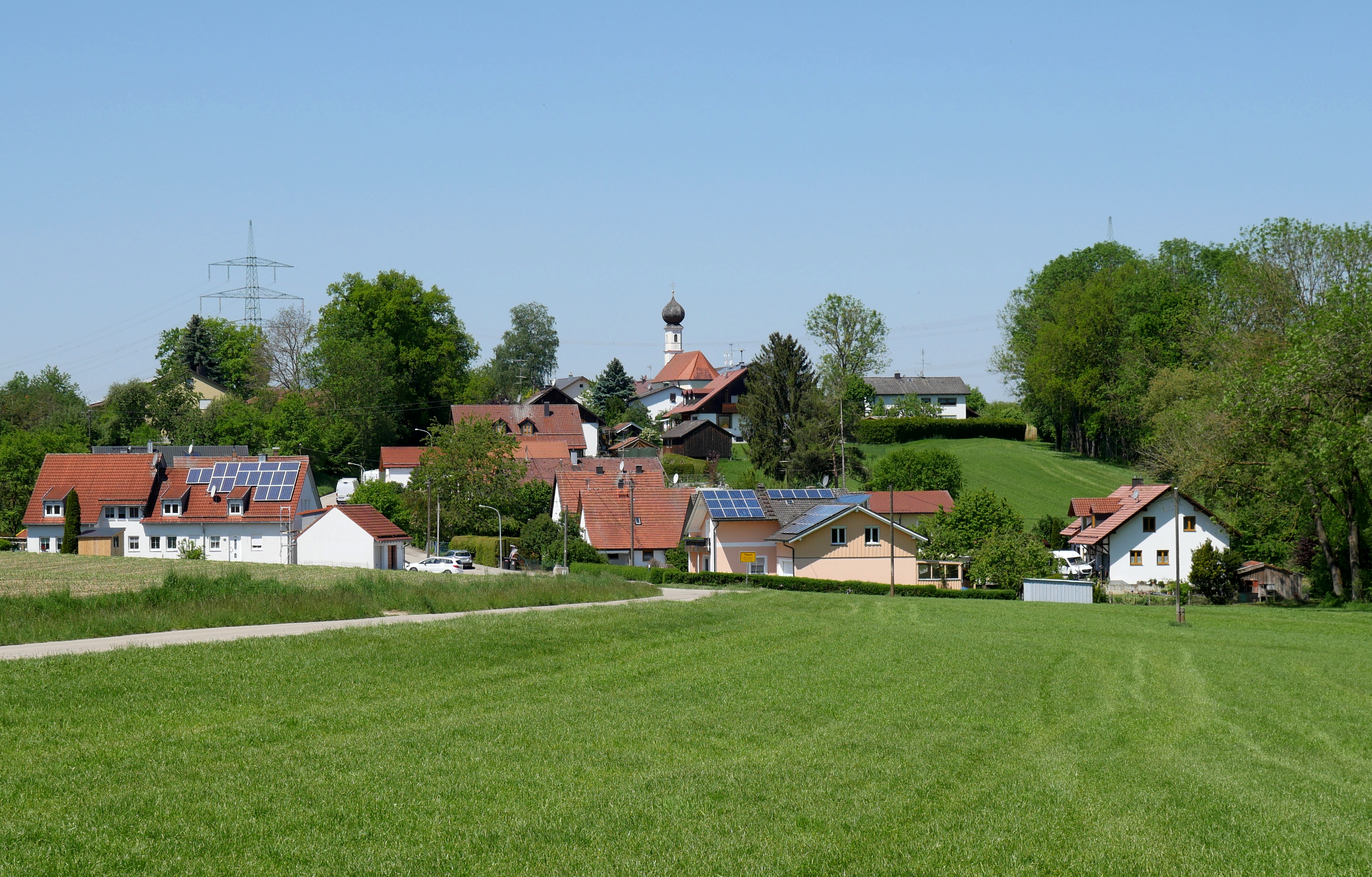 Blick auf das Dorf Thann, Ortsteil der Gemeinde Lengdorf, mit der Filialkirche St. Nikolaus. Ansicht von Osten vom Bahnhof Thann-Matzbach.